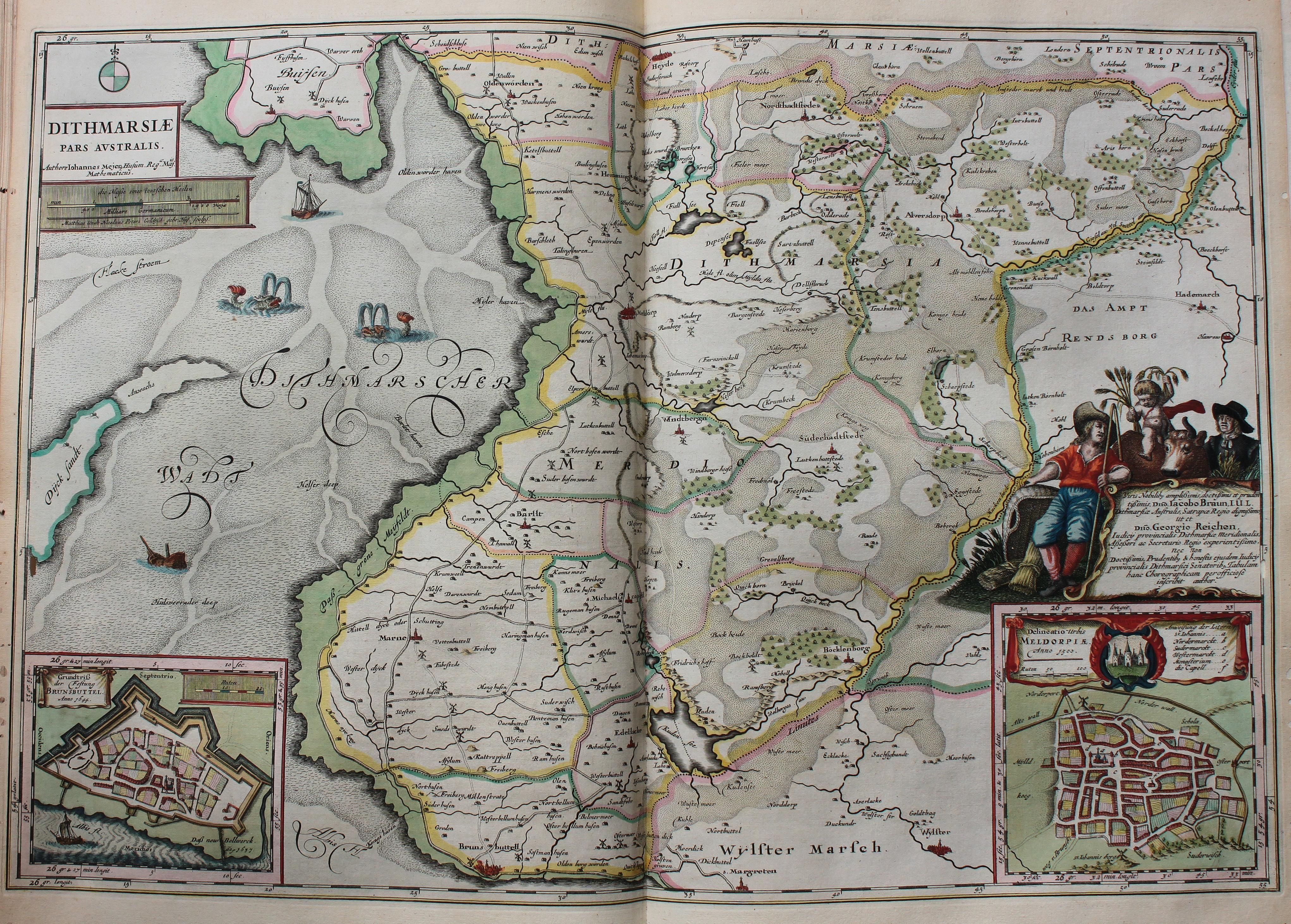 Descripción bibliográfica: Geographia Blaviana. - [Amsterdam : Juan Blaeu, 1659] . - [32], VI, 96 p., 34 f., h. 35a, 35b, 35c, 35d, 36-44 f., 34, [2], 36-40, [2], 43-70 [i. e. 75], [1] f., [20] p. de map., [9] f. de map., [4] f. pleg. de map., [2] f. de plan., [2] f. ge grab. : |bil. ; |cFol. marca major (57 cm.) . - En la dedicatoria a Felipe IV: "Presenta ... El Atlas Universal y Cosmographico de los orbes y terrestre ... Juan Blaeu" . - Título tomado del frontispicio. -- Privilegio fechado en 1659. -Errores de pag. - Sign.: 1, *2, **3, ***-****2, a-e2, A-I2, K1, L-Z2, Aa-Dd2, 4 2, Ee-Ff2, A-I2, K1, L2, M1, N-Y2, Z5, Aa-Dd2, Ee1, A-D2, E-F1, G-I2, K-L1, M-O2, P1, Q-Z2, Aa-Bb2, Cc1, Dd3, Ff-Zz2, Aaa-Bbb2, . - Frontispicio grab. col. -- Incluye un total de 49 il. entre map., plan. i grab. Materia: Atlas - Obras anteriores a 1800 Impresor: Blaeu, Joan, 1596-1673, imp. Lugar de impresión: Holanda. Amsterdam Localización: Vea la ilustración en su contexto Visite también la exposición "Cartografía histórica en la Biblioteca de la Universidad de Sevilla"